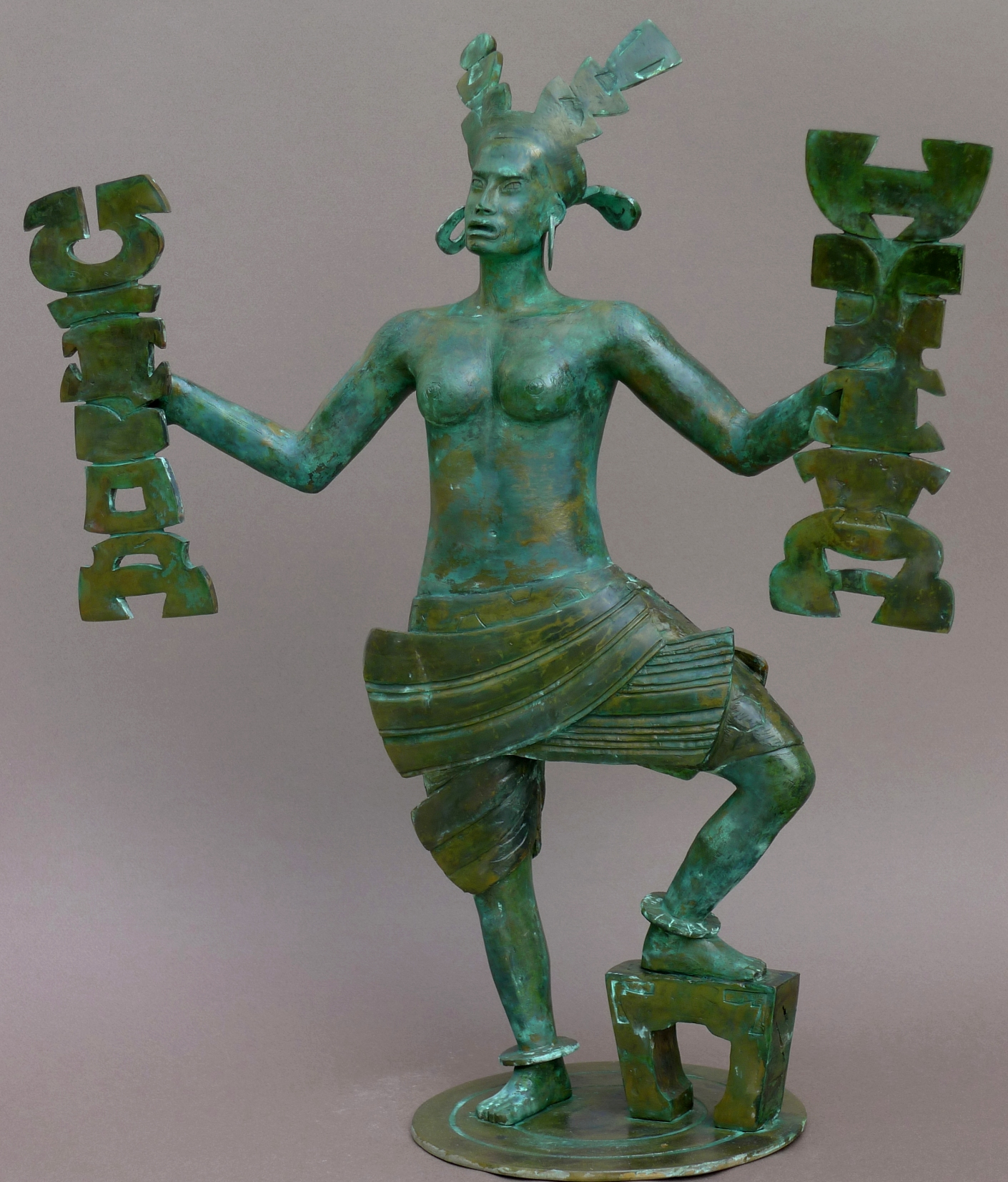 Sculpture en bronze de Christine Jongen (née en 1949, donc téléchargement interdit), 2012, hauteur 57 cm, coulée à la cire perdue en un seul et unique exemplaire.